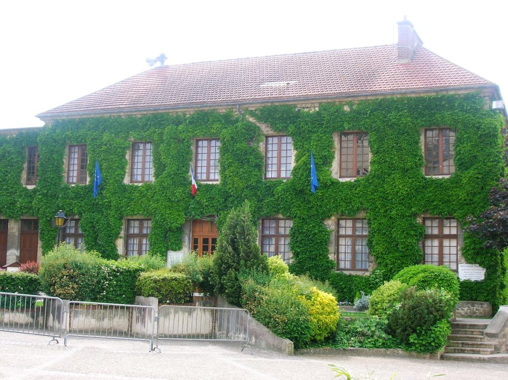 Mairie de Coye la foret